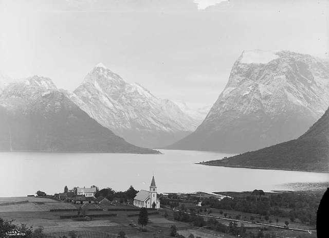 Hjørundfjord kyrkje på Sæbø ved Hjørundfjorden i Ørsta)